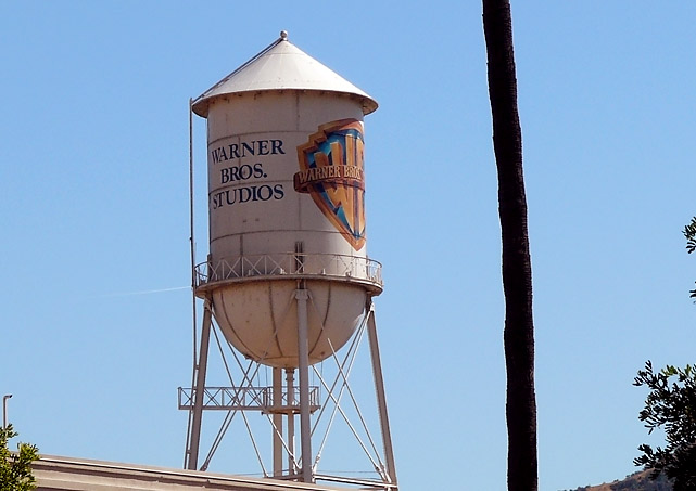 La tour d'eau de la Warner Bros